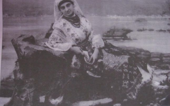 Principesa Elena Bibescu